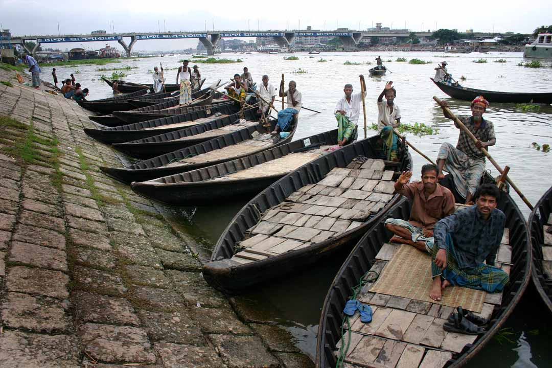 Dhaka, Bangladesh